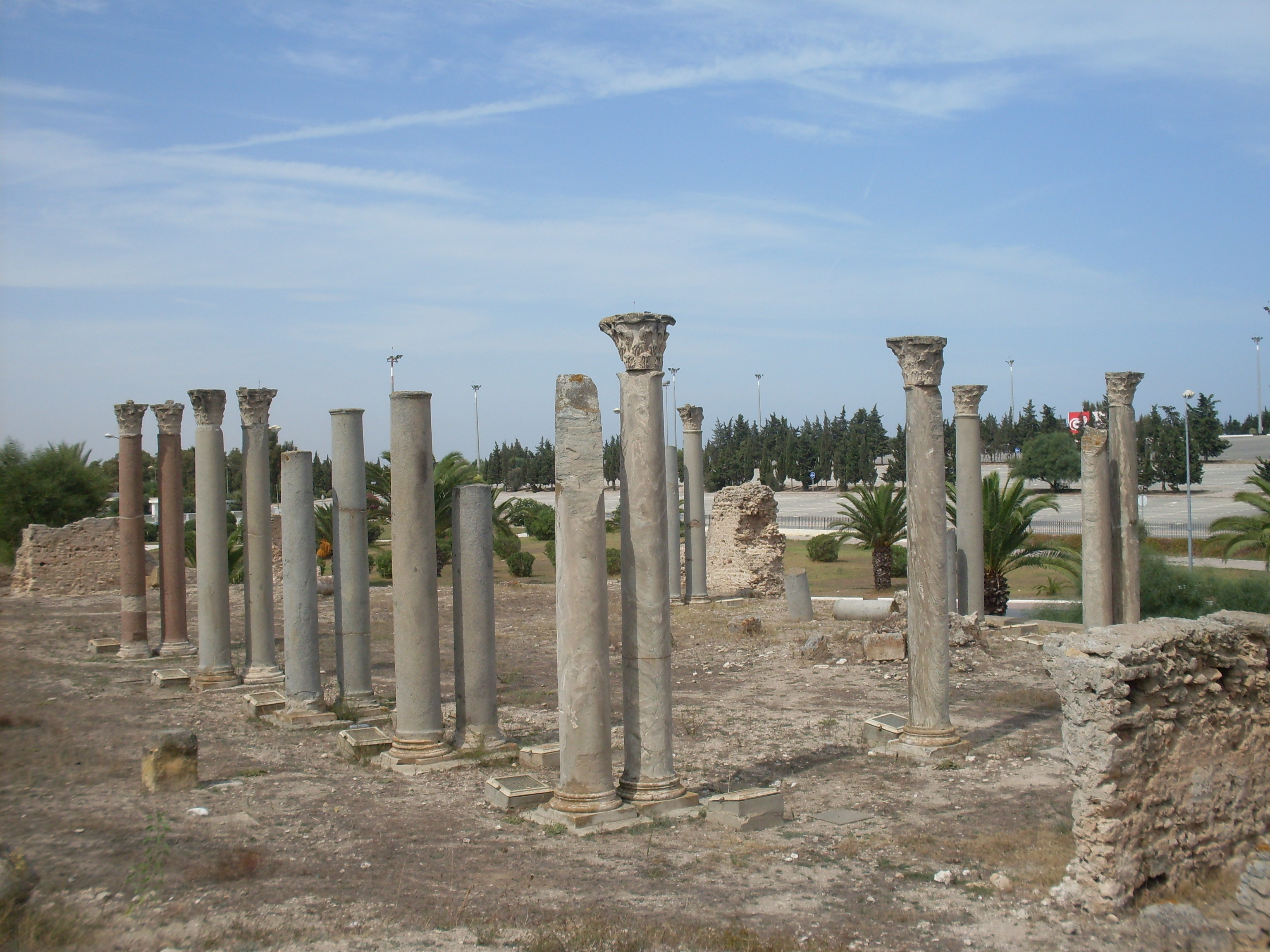 Tunisie, Edifice des colonnes à Carthage